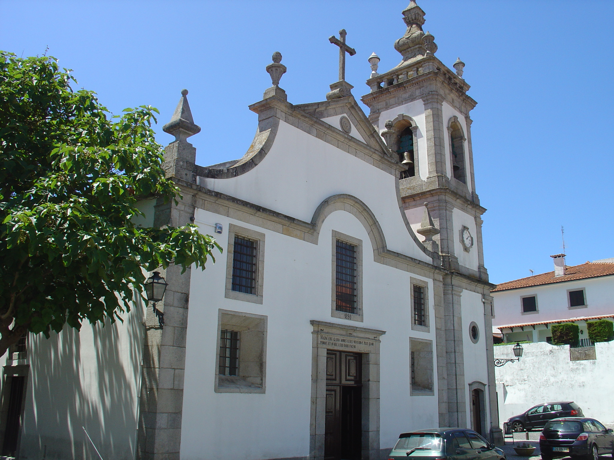 Património Local, caráter religioso. Igreja paroquial de Fão